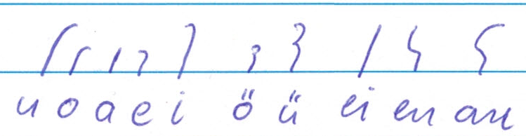 Dolnoserbski: Die Vokalzeichen der Nationalstenografie um 1900.